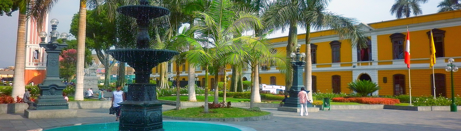 Centro Cultural "La Casona" de la Universidad Nacional Mayo de San Marcos, Parque Universitario, Lima, Peru.